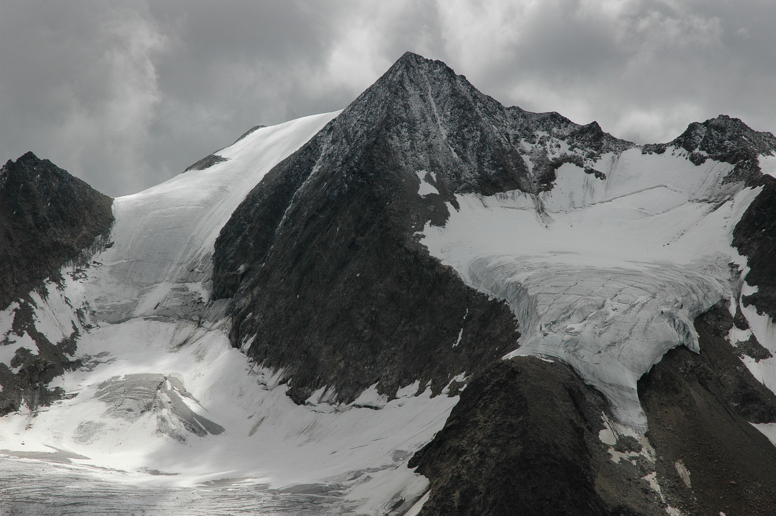 Blick vom Aperern Turm (2984 m) nach Südosten zur Östlichen Seespitze (3416 m) mit dem Alpeiner Kräulferner links und dem Seespitzferner rechts.